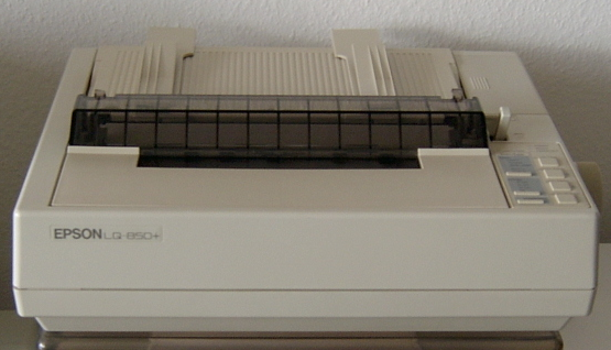 Epson Matrixdrucker LQ-850+